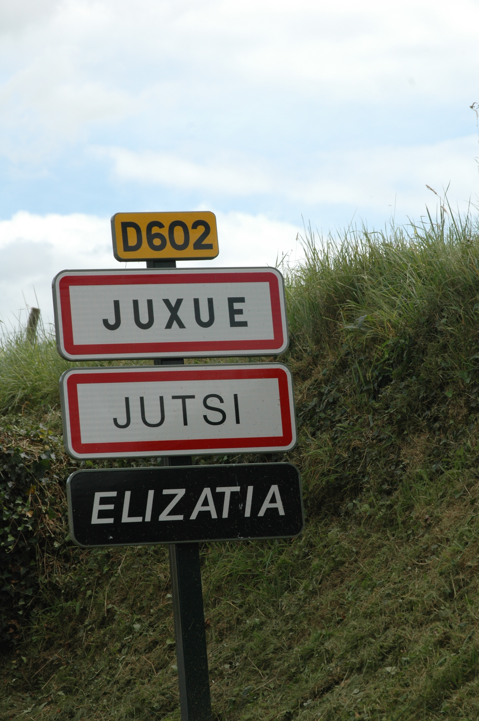 Entrée de Juxue sur la D602